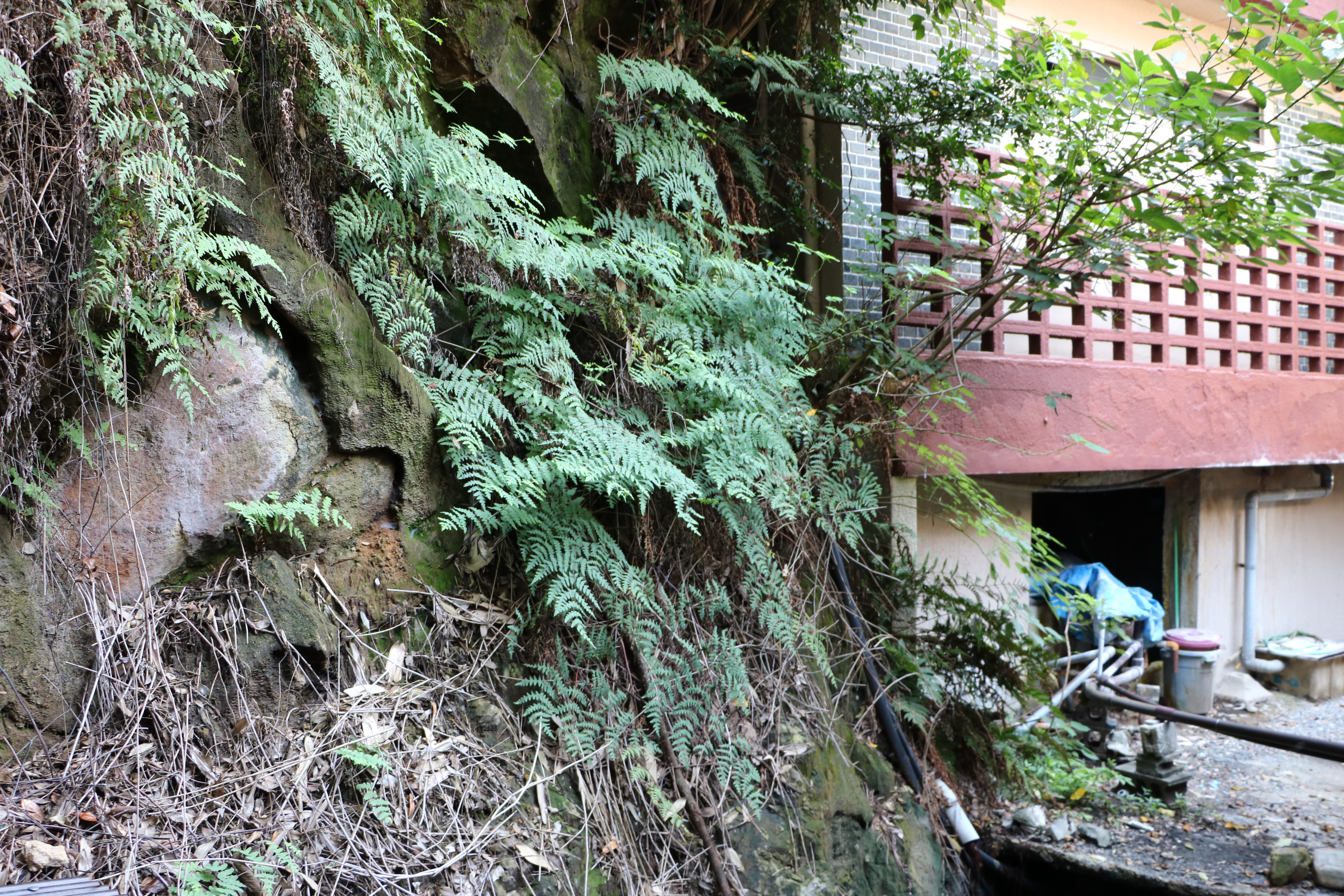 国指定天然記念物ユノミネシダ自生地（和歌山県田辺市本宮町湯の峰温泉）